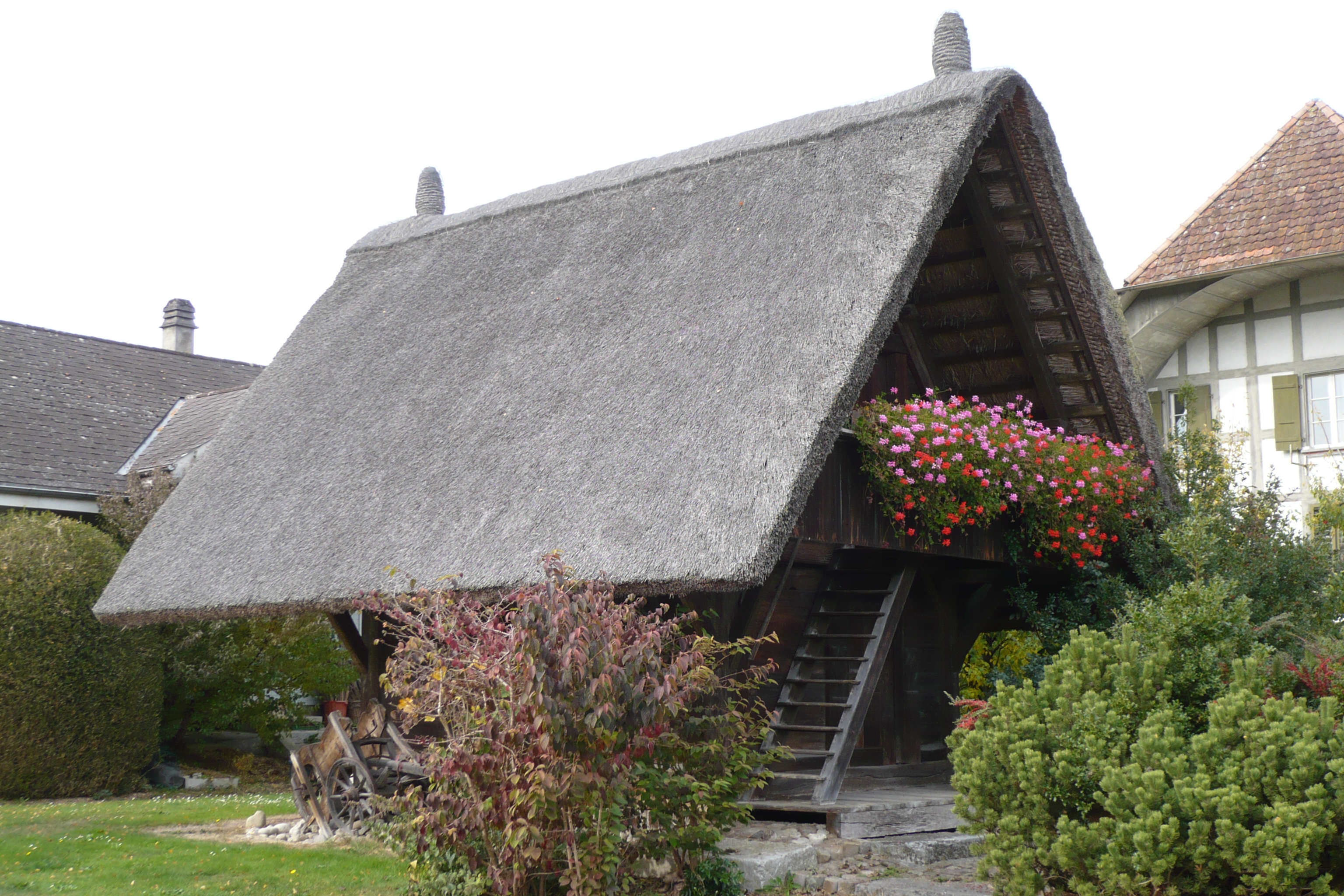 Utzensdorf im Siedlungsgebiet - Unterdorfstrasse Speicher